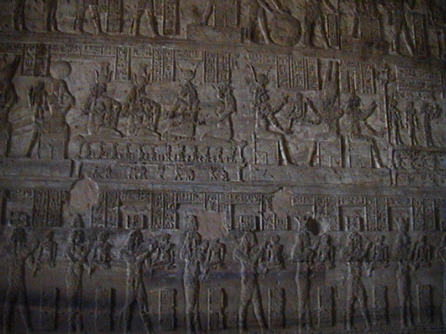 Vue d'un des murs intérieurs du mammisi romain du temple d'Hathor